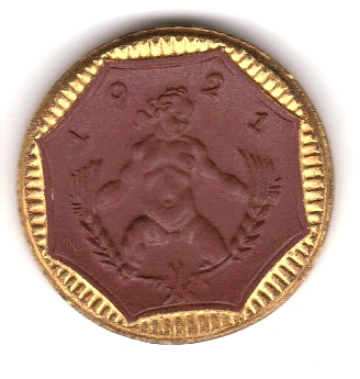 Porzellangeld 5 Mark von 1921 Bildseite